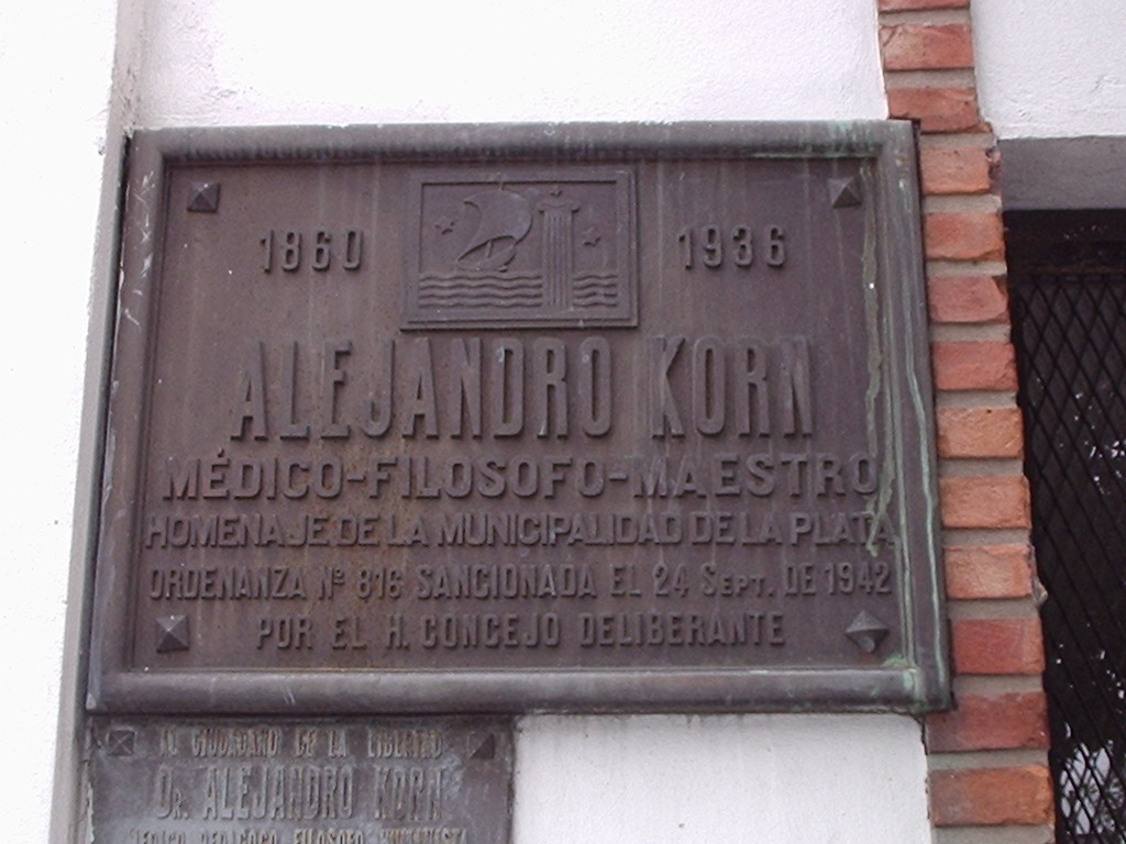 ‘’Placa de imposición del nombre Alejandro Korn a calle 19 en La Plata.